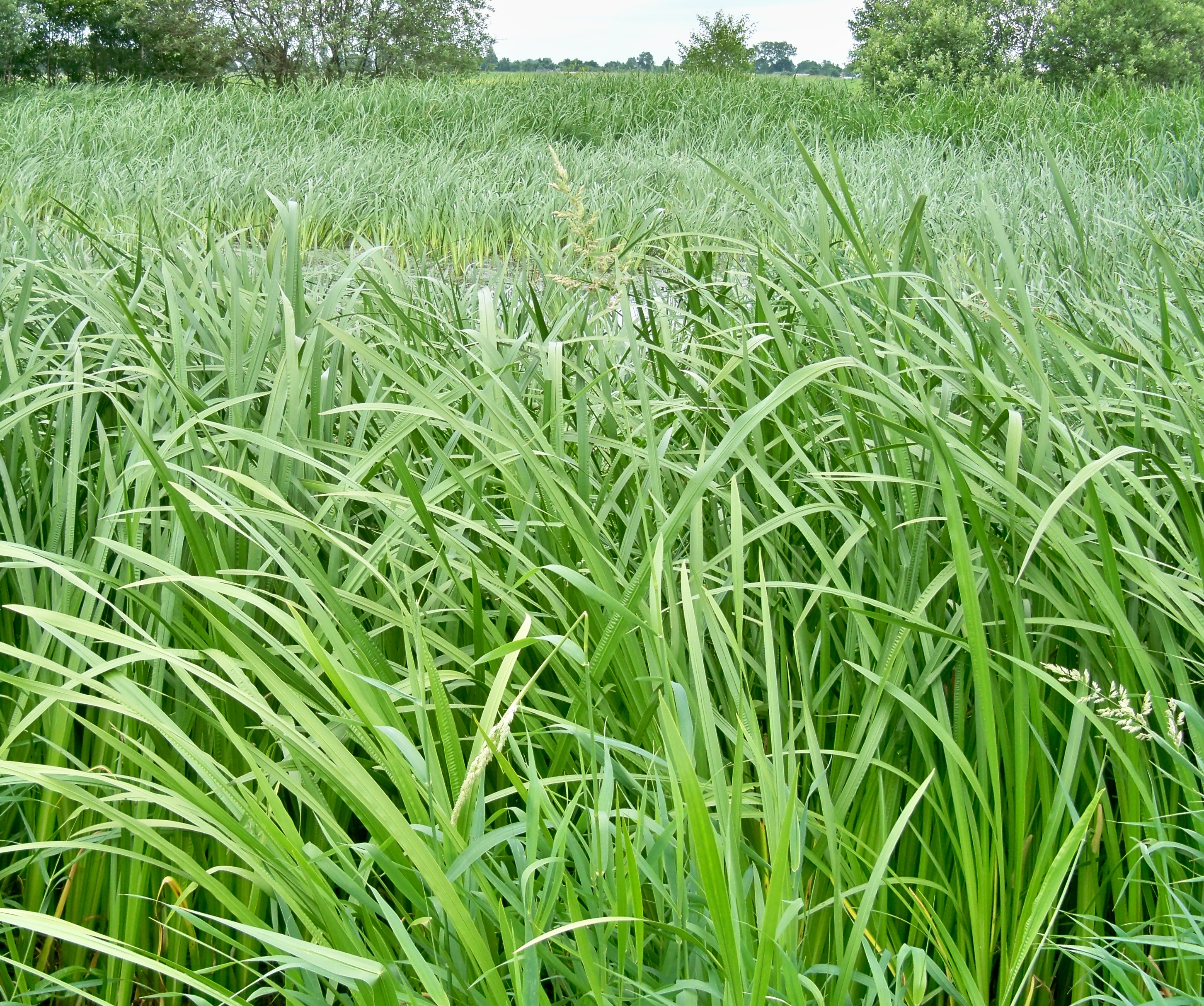 Szuwar tatarakowy (Acoretum calami) zarastający zbiornik astatyczny pod Roguszynem k. Węgrowa